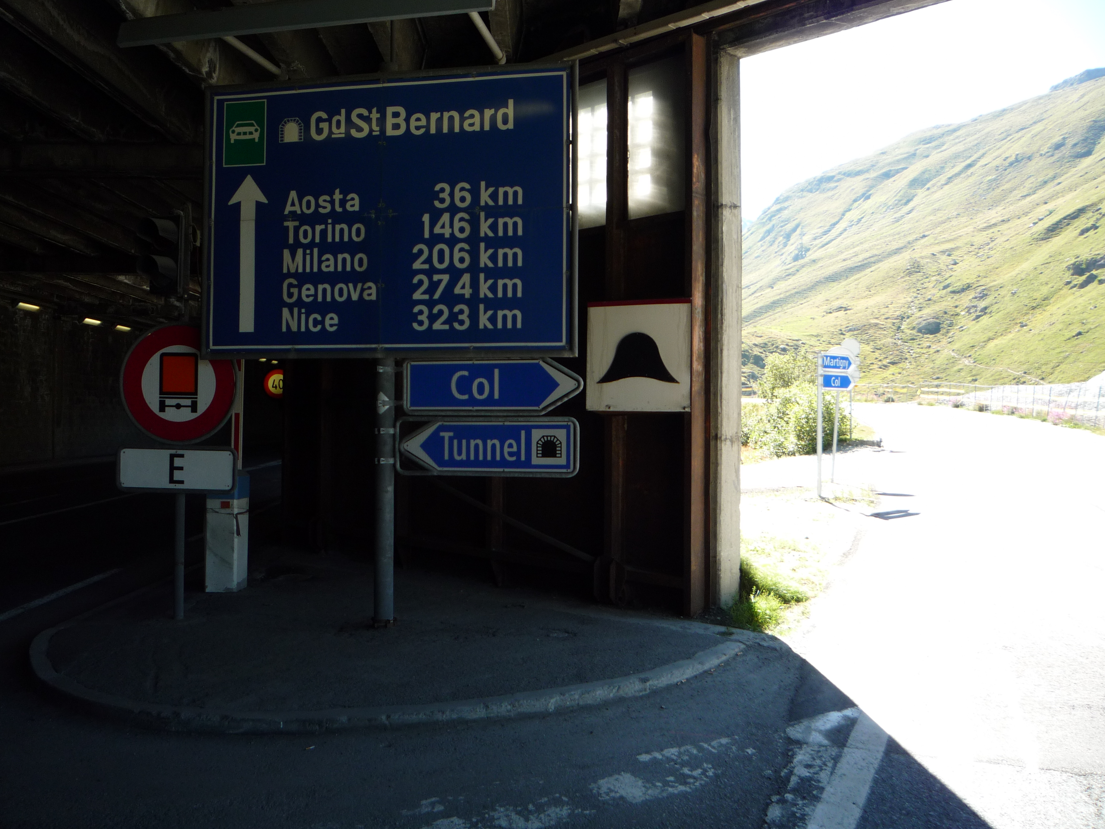 Panneau se trouvant dans le Tunnel du Grand-Saint-Bernard, du côté suisse, à l’intersection entre le tunnel et le col du Grand-Saint-Bernard